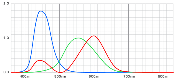 CIE Tristimul